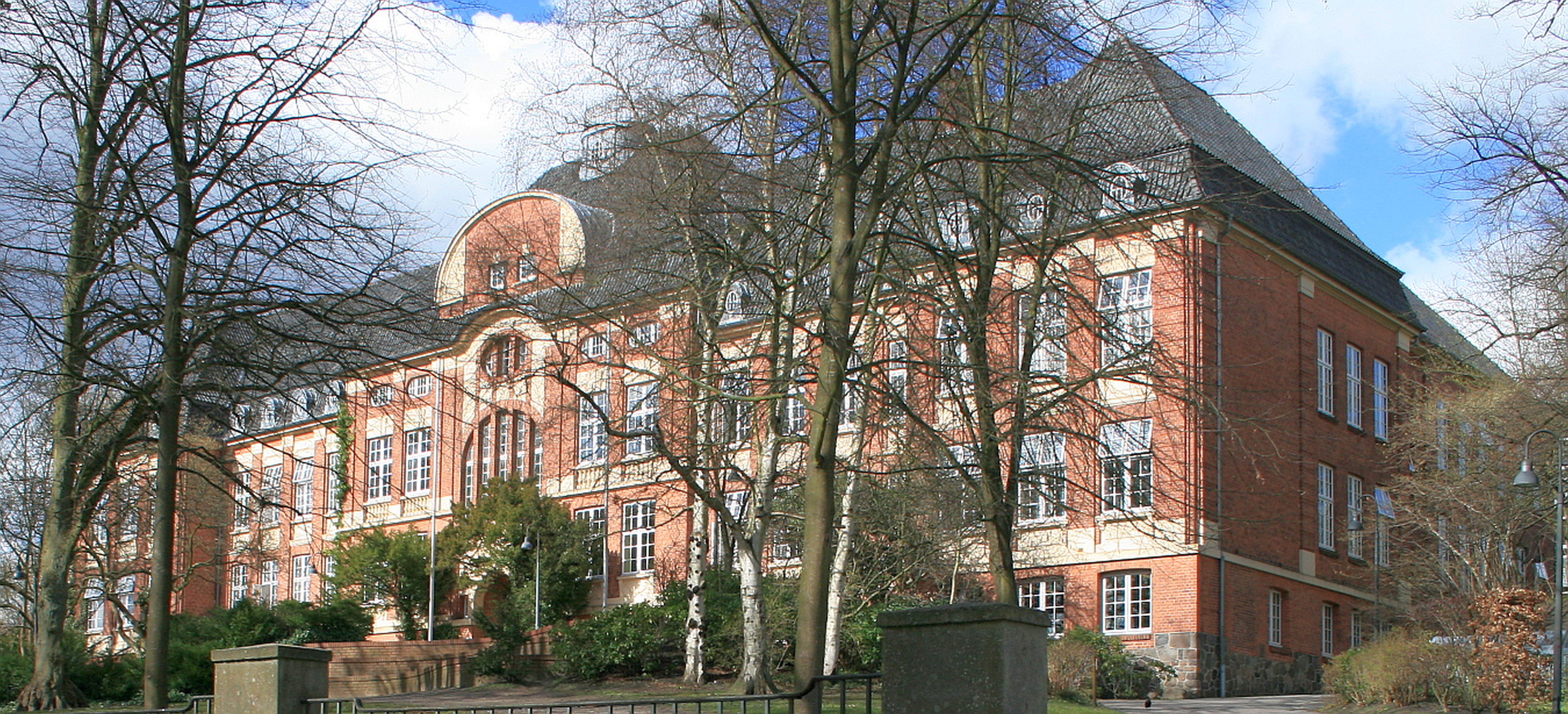 Lornsenschule Schleswig